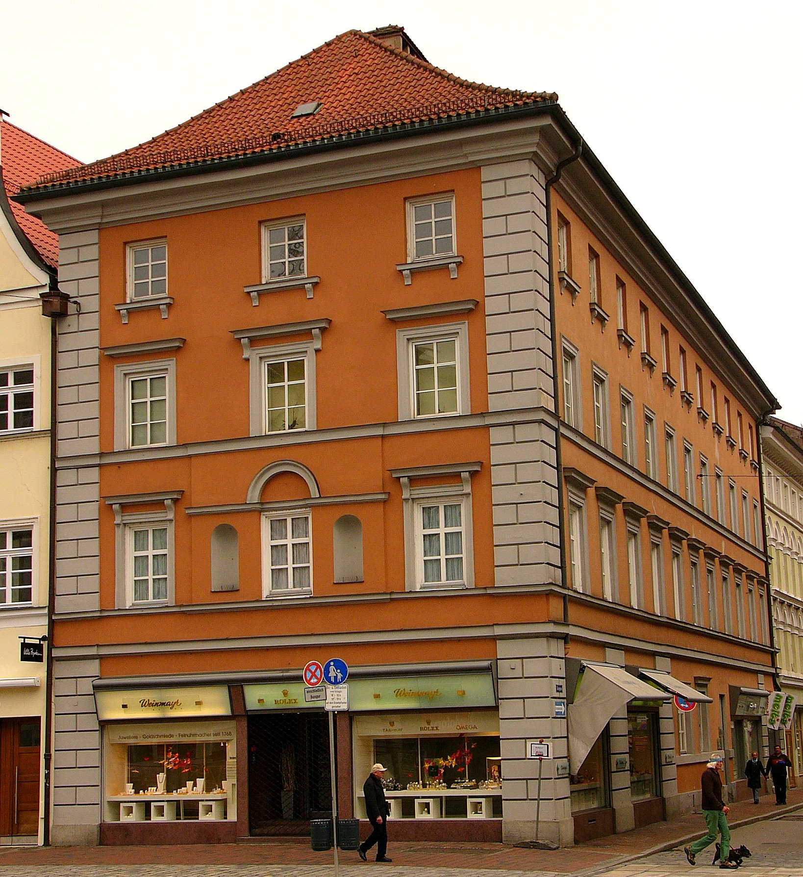 Stattliches viergeschossiges Eckhaus mit Walmdach, um 1830 erbaut von Johann Bernlochner; im 1. Obergeschoss zwei Nischen mit den Hl. Florian und ChristophorusThis is a photograph of an architectural monument.